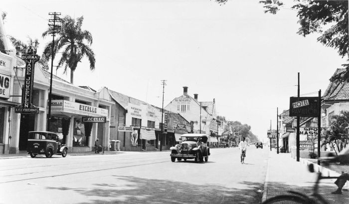 Repronegatief. De Rijswijkstraat in de jaren '30 richting Harmonieplein. Langs de straat veel winkels met in het midden de apotheek Rathkamp.